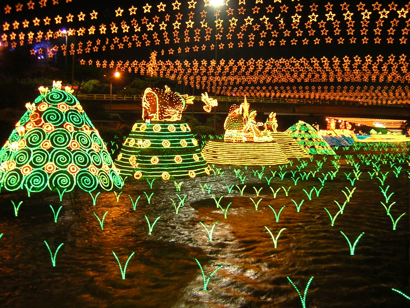 Alumbrados Navideños sobre el Río Medellín 2006, Medellín, Colombia